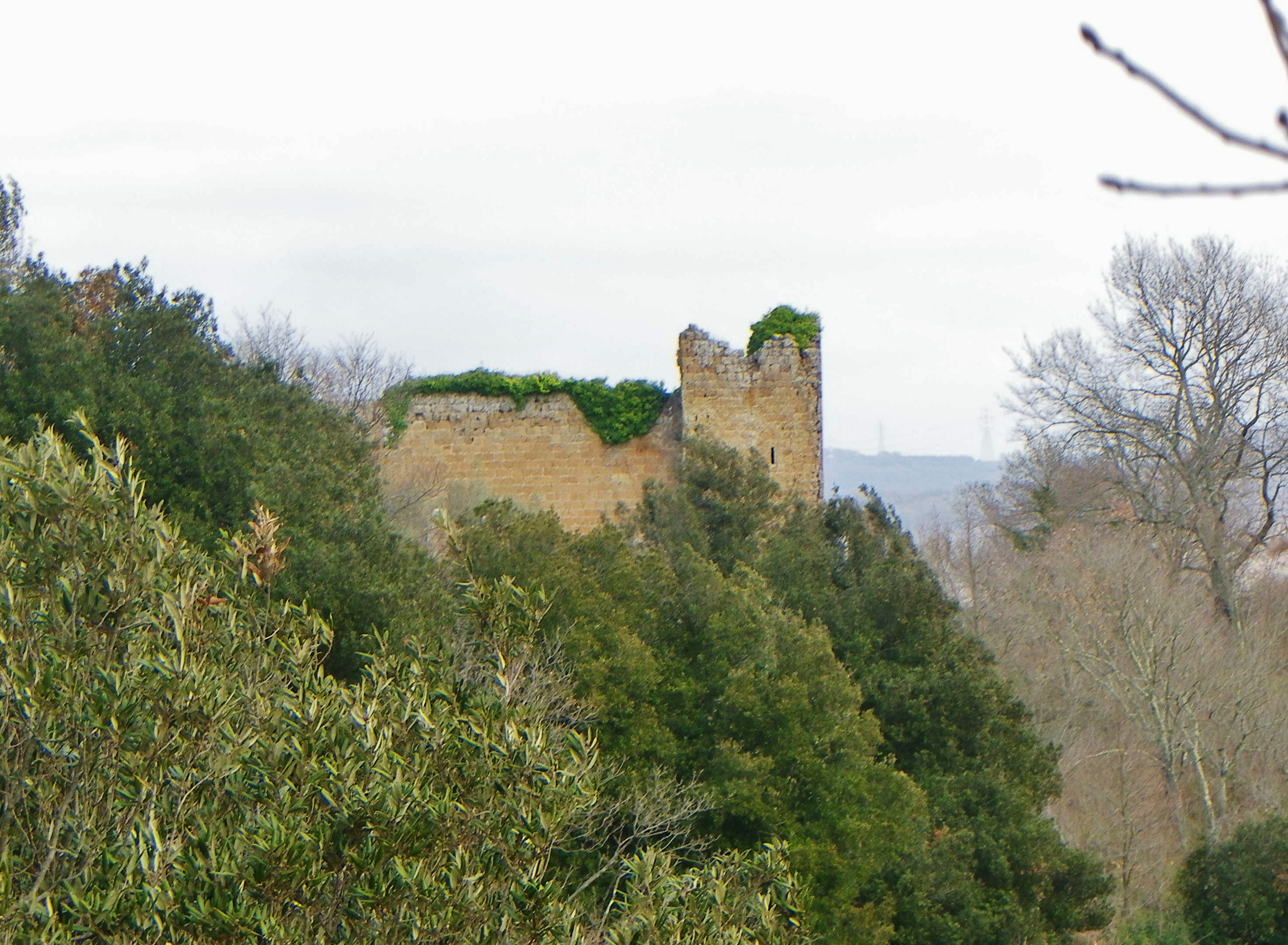 Altopiano S.Giovenale - ruderi castello dei Di Vico (XIII sec.)